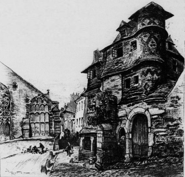 Morlaix : l'ancienne Porte des vignes (lithographie d'Albert Robida publiée dans "La vieille France, Bretagne" vers 1900).